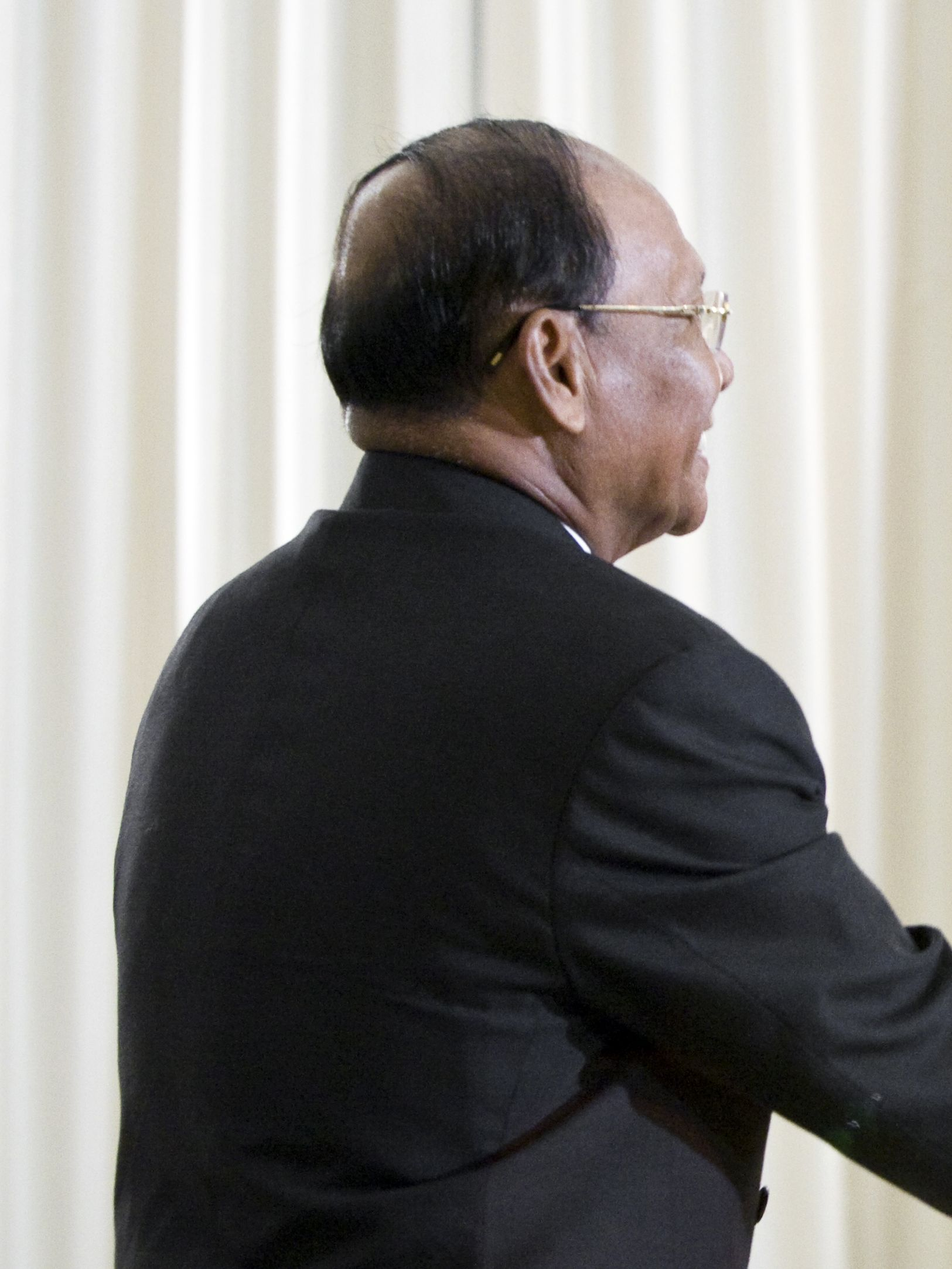 สมเด็จอัครมหาพญาจักรีเฮง สัมริน ประธานสภาแห่งชาติกัมพูชา เข้าเยี่ยมคารวะนายกรัฐมนตรี ณ ห้องสีงาช้าง ตึกไทยคู่ฟ้า ทำเนียบรัฐบาล 7สิงหาคม2552 (The Official Site of The Prime Minister of Thailand Photo by พีรพัฒน์ วิมลรังครัตน์)